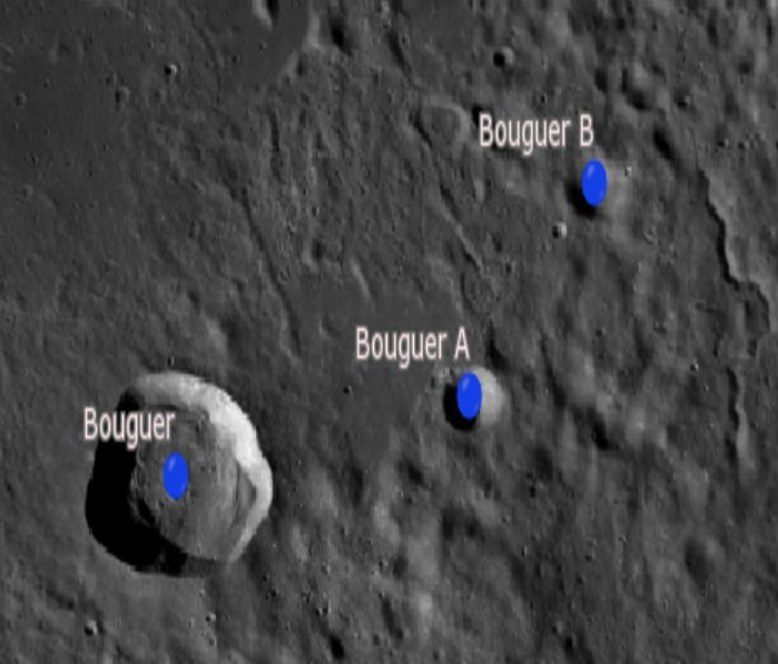 Cráter lunar Bouguer. Cráteres satélite. (Imagen LRO)